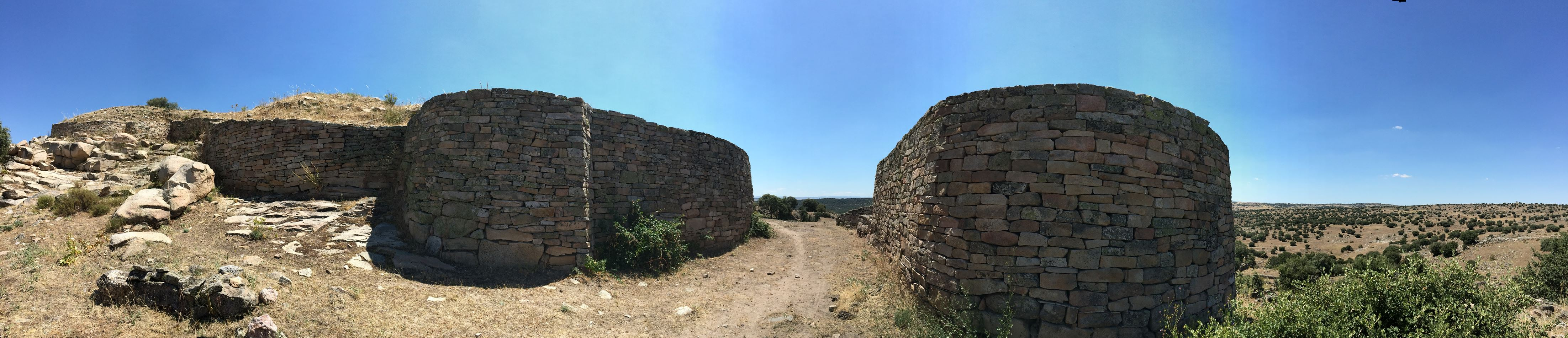 Segunda Edad del Hierro